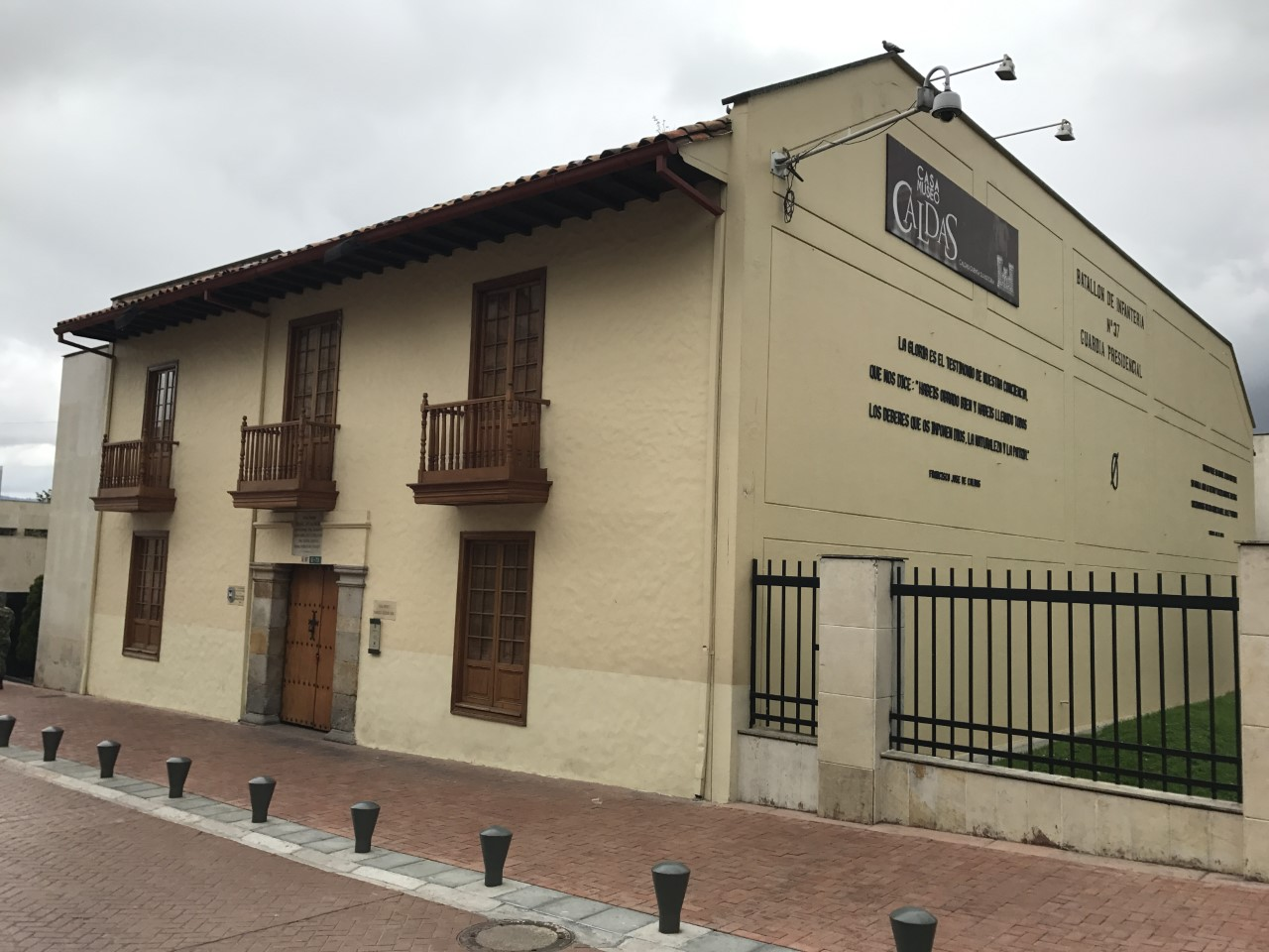 Casa que habitó el Sabio Caldas en Bogotá